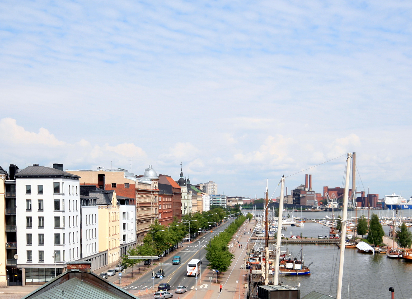 Pohjoisranta, Helsinki.